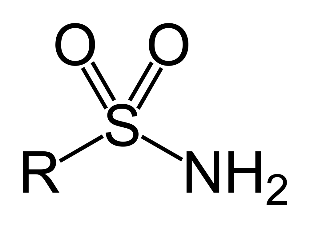 Sulfonamide-group